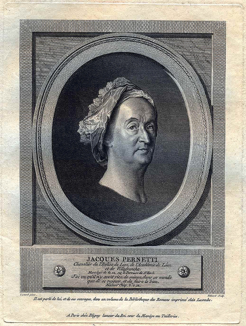 Grabado de Jacques Perenetti.